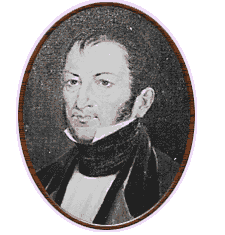 Retrato al óleo de Nicolás Bravo Rueda (1786-1854) político y militar mexicano. Presidente de México en tres ocasiones: 1839, 1842 - 1843 y 1846.